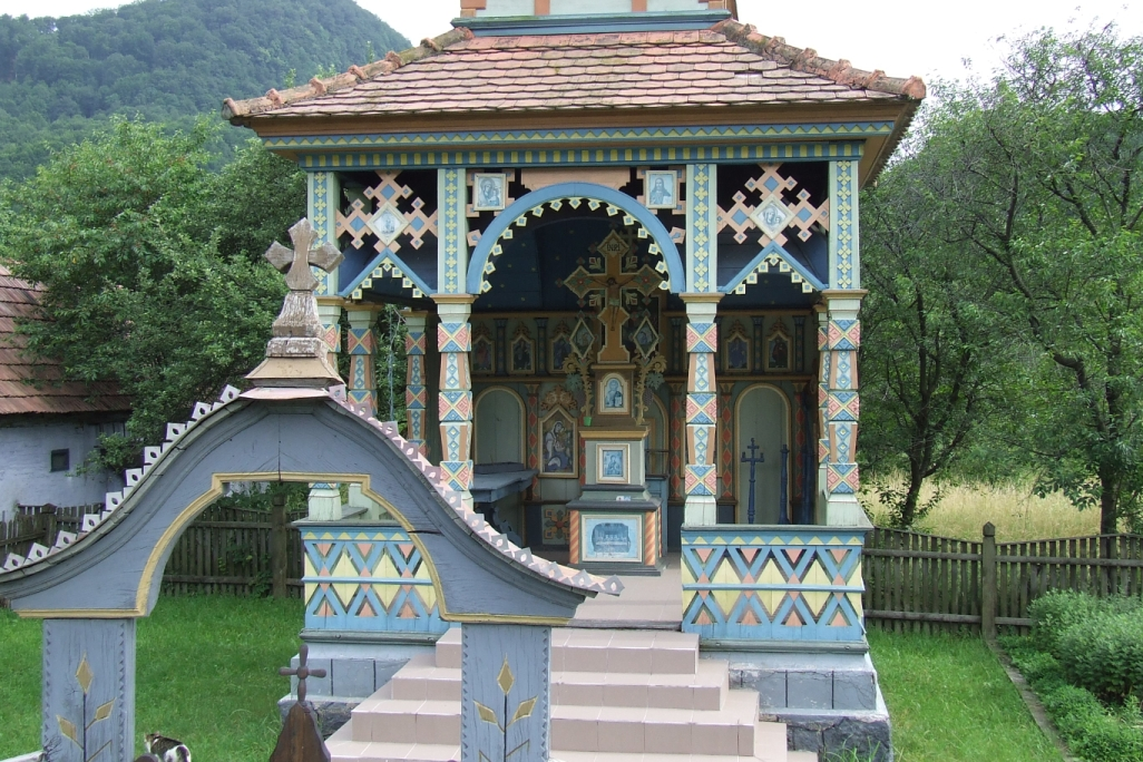 Image from Gălăoaia village, Mureş County, Romania